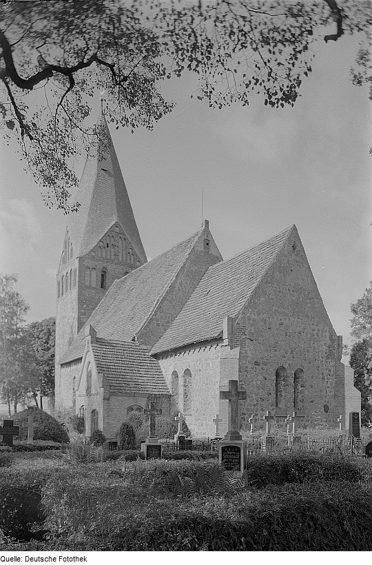 Original image description from the Deutsche Fotothek Levin. Johanniskirche